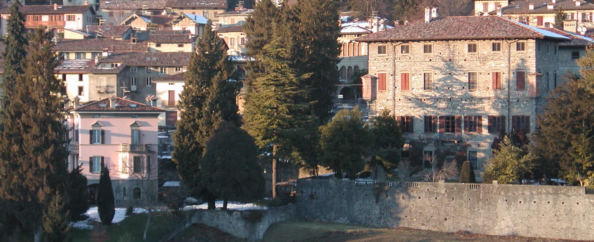 Clusone, provincia di Bergamo, Italy palazzo fogaccia made by Paolo da Reggio